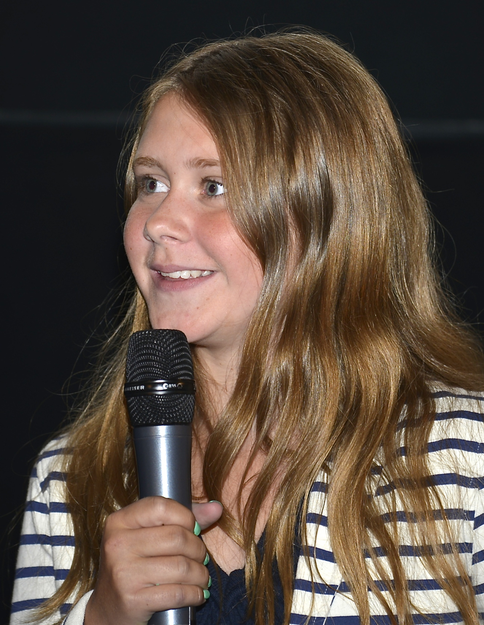 Tea Stjärne under presentationen av den Svenska filmhösten 2014 i Filmhuset i Stockholm den 18 augusti 2014.